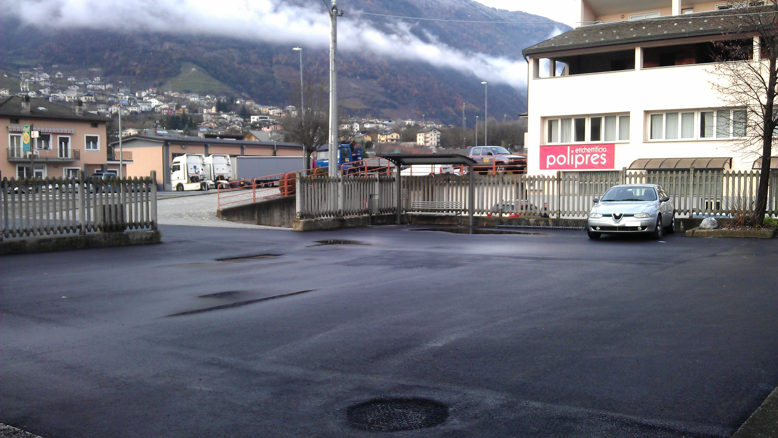 Stazione di Bianzone, piazzale antistante stazione e parcheggio